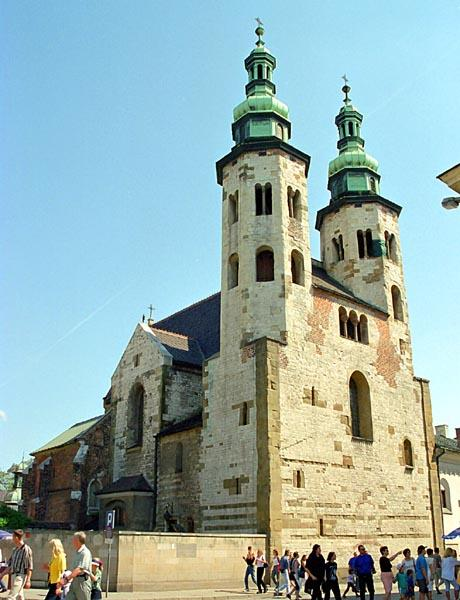 Krakow (Poland) St Andrew Church